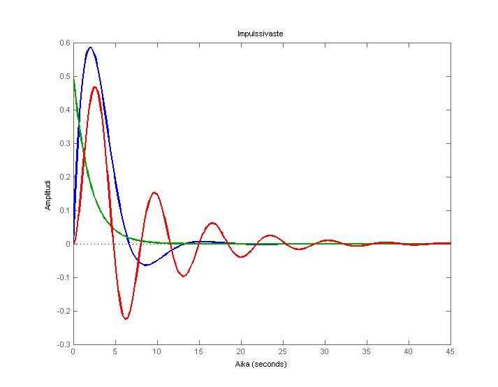 Ensimmäisen, toisen ja kolmannen kertaluvun järjestelmien impulssivasteet. Kuvasta voidaan huomata, että kertaluvun kasvaessa yli yhden, alkaa järjestelmä värähtelemään.